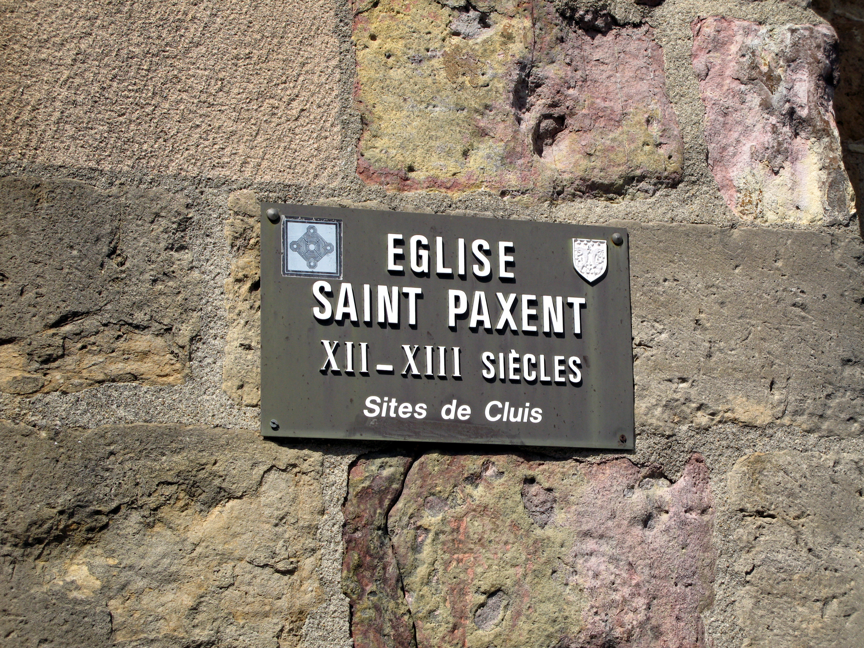 Cluis (Indre, France) - L'église Saint-Paxent.